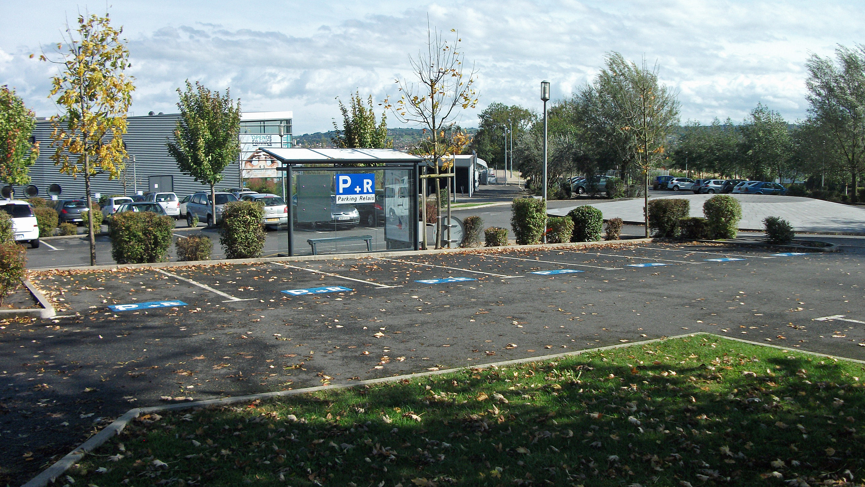 Parking relais du Stade Aquatique aménagé en 2013-2014 derrière l'arrêt de bus du même nom (bien qu'anonyme à première vue).